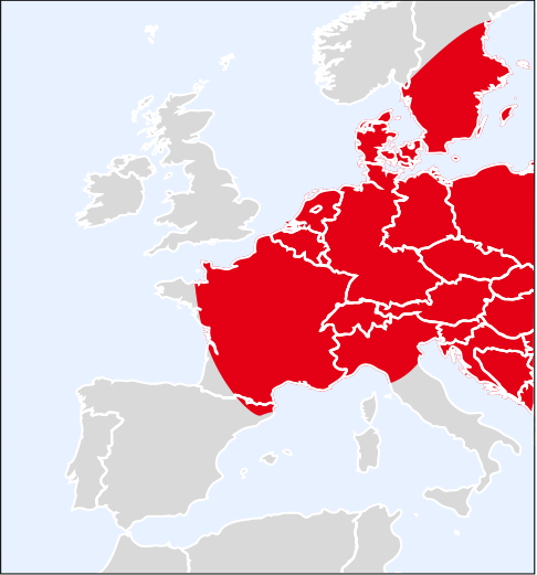 Répartition Lemonia dumi